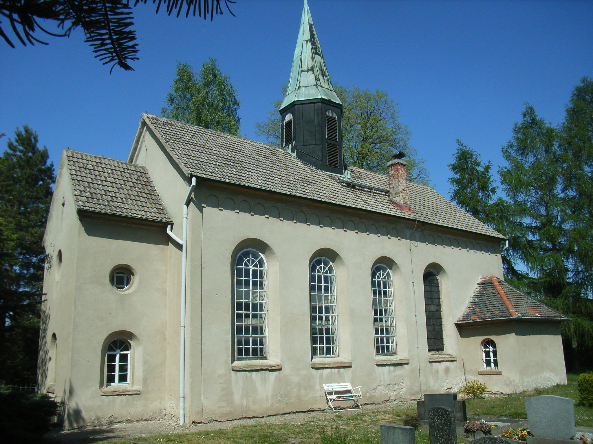 Taborkirche in Heuersdorf, Landkreis Leipziger Land, Sachsen